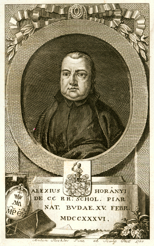 Horányi Elek arcképe, Anton Tischler metszete. Horányi Elek Horányi «Nova Memoria. I. (Pest, 1792)» című műve melléklete gyanánt jelent meg. Aláirása: «Anton Tischler Pinx. et Sculp. Pest 1788.»